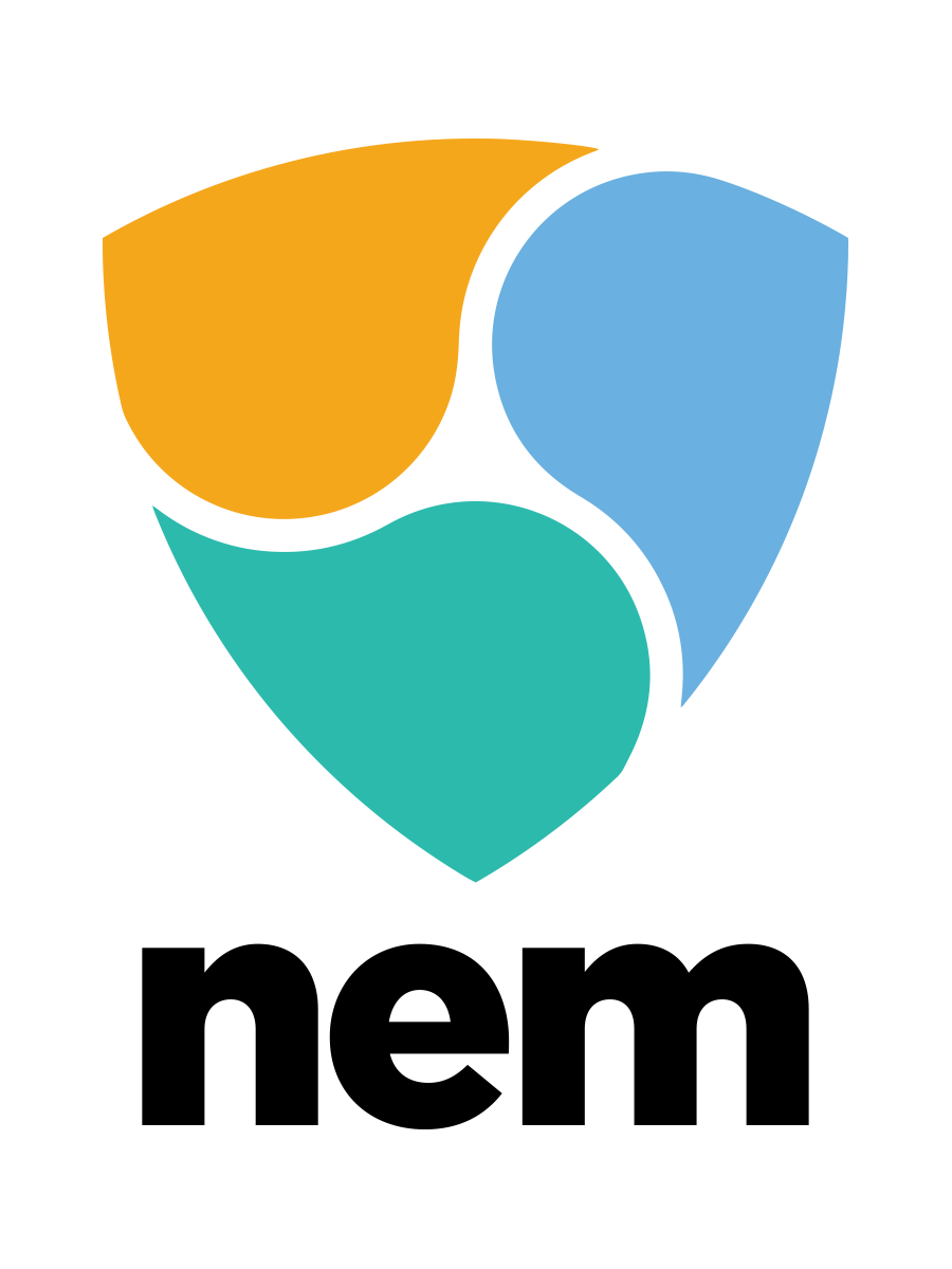 nem.io logo